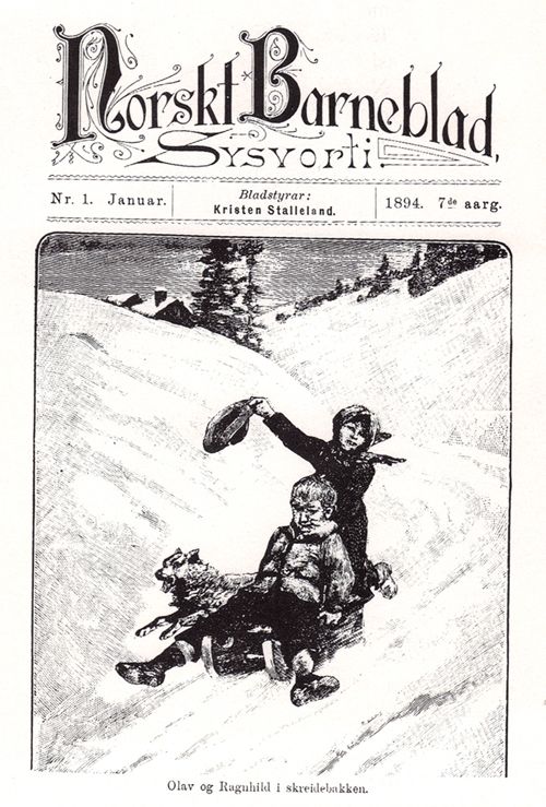 Norskt Barneblad nr. 1 1894